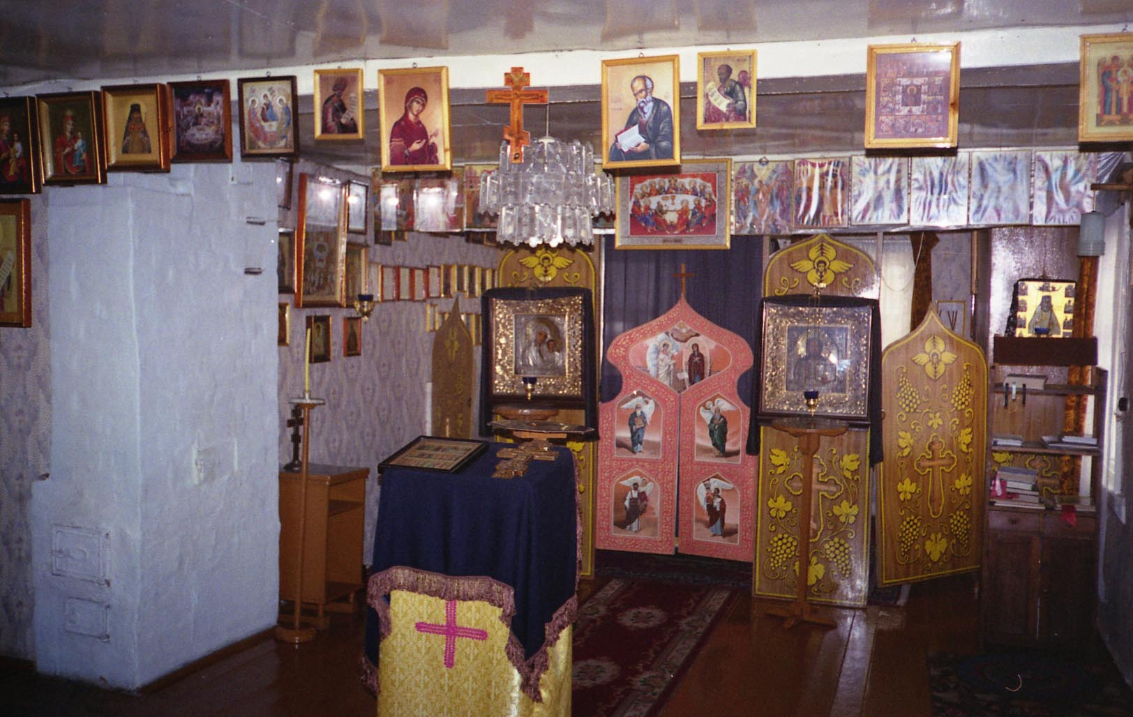 храм алфёрова